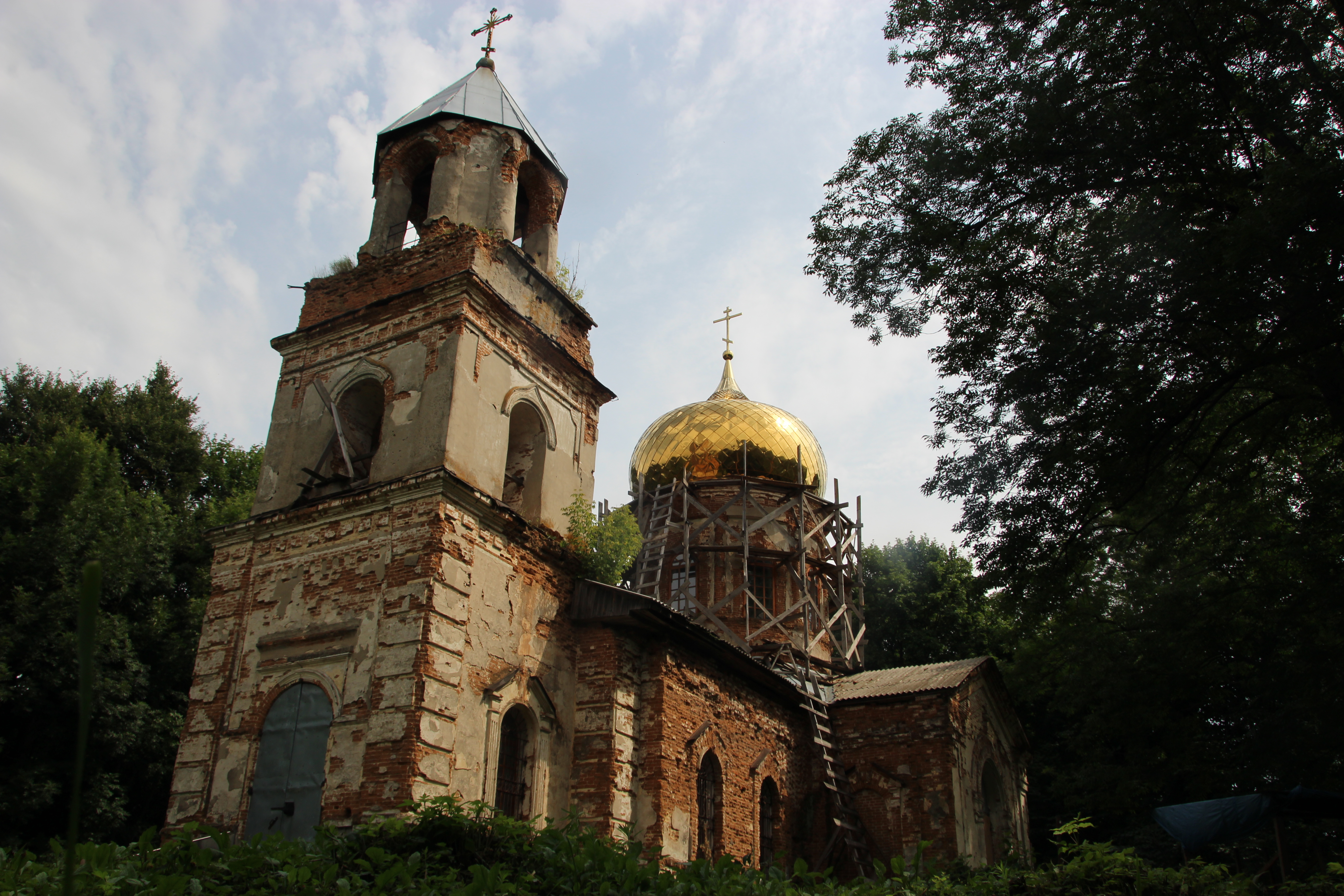 Миколаївська церква, Путивльський район, с. Яцине